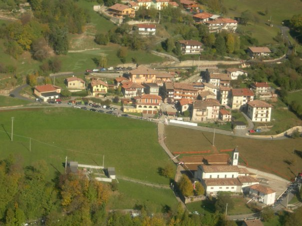 Veduta di Bondo, fraz. di Colzate